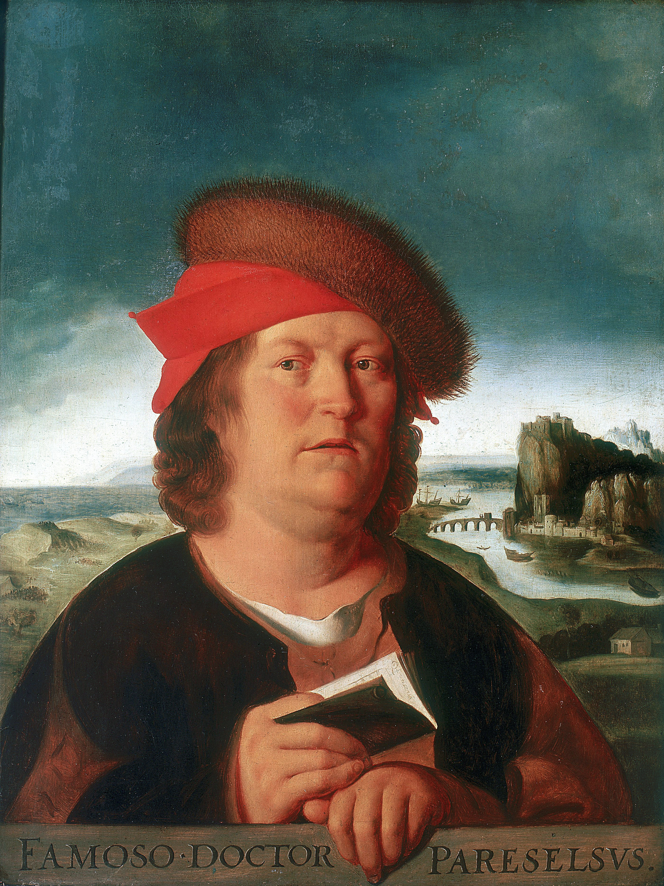 PORTRAIT PRESUME DU MEDECIN PARACELSE (1493-1541)une des nombreuses copies anomymes du XVIIe siècle